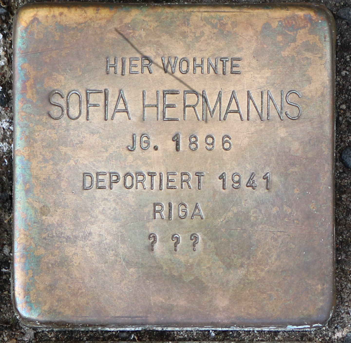 Stolperstein: Sofia Hermanns (Blücherstraße 12), Mönchengladbach.